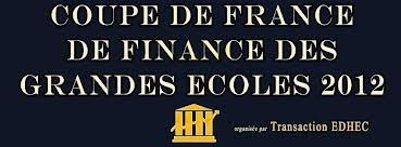 Coupe de France de Finance des Grandes Ecoles